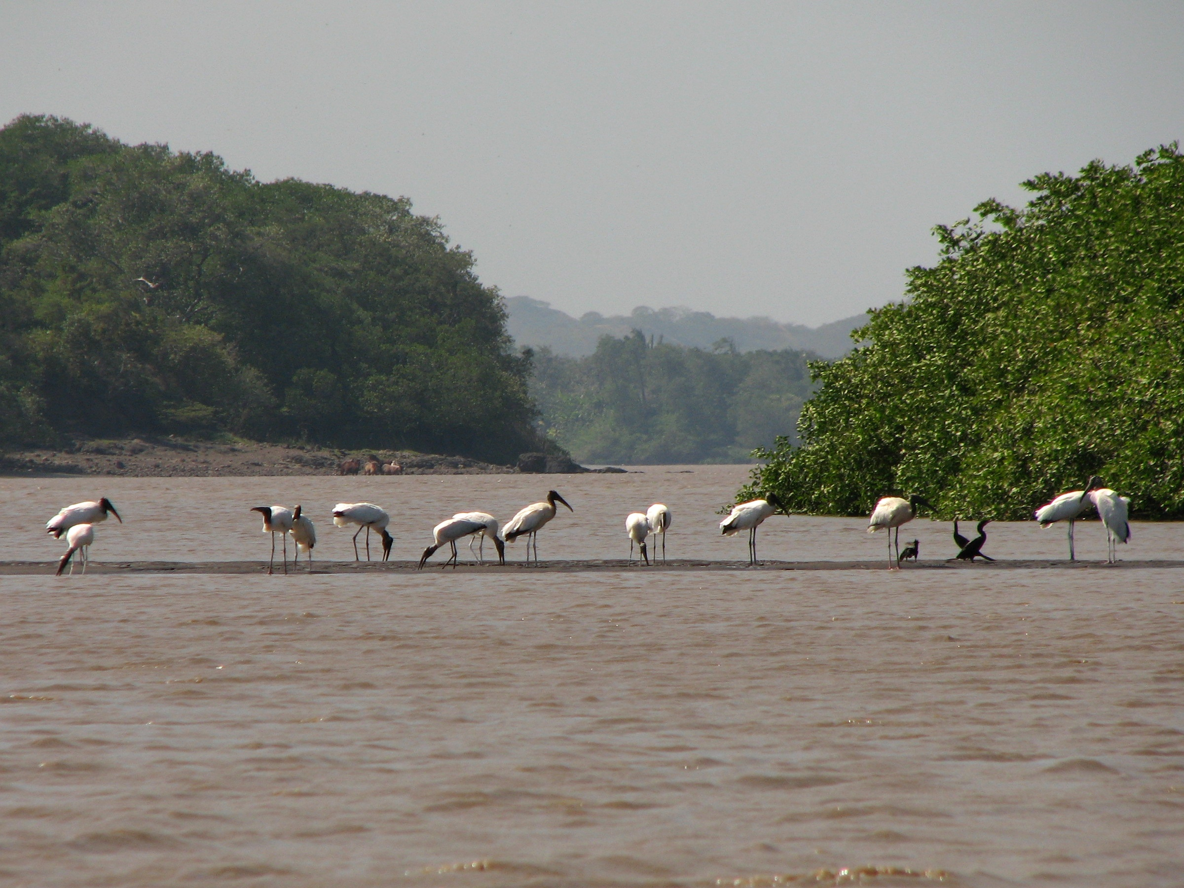 Cigüeñones (Mycteria americana) en el Rio Tempisque (Costa Rica).